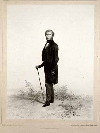 obrázek z